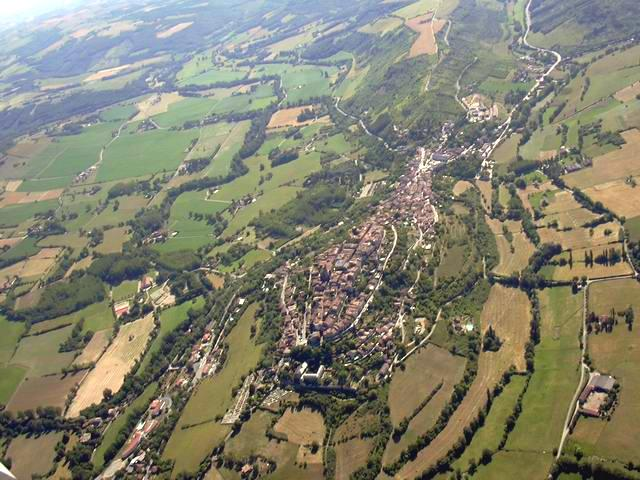 Cordes sur Ciel Auteur Xavier Bonnafous (Xulin)